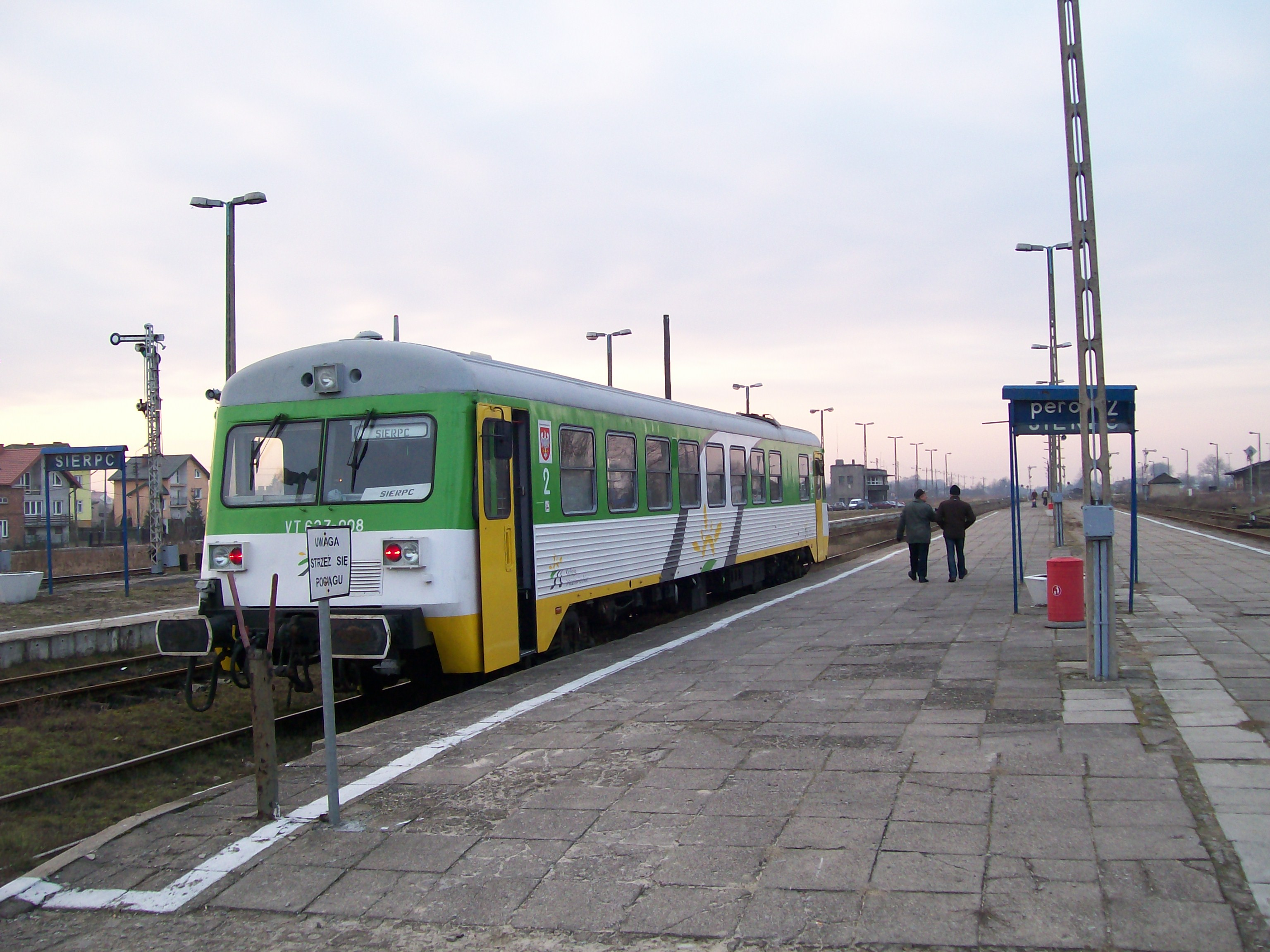 Szynobus. Sierpc.